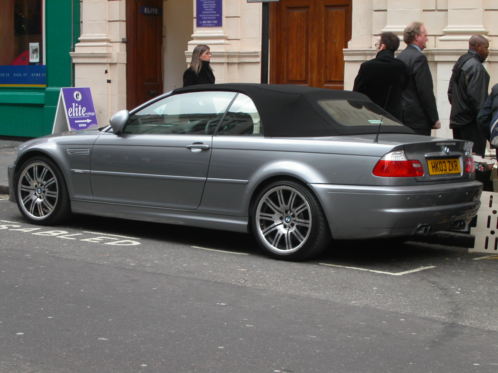 BMW Série 3 E46 - M3 Cabriolet Phase 2